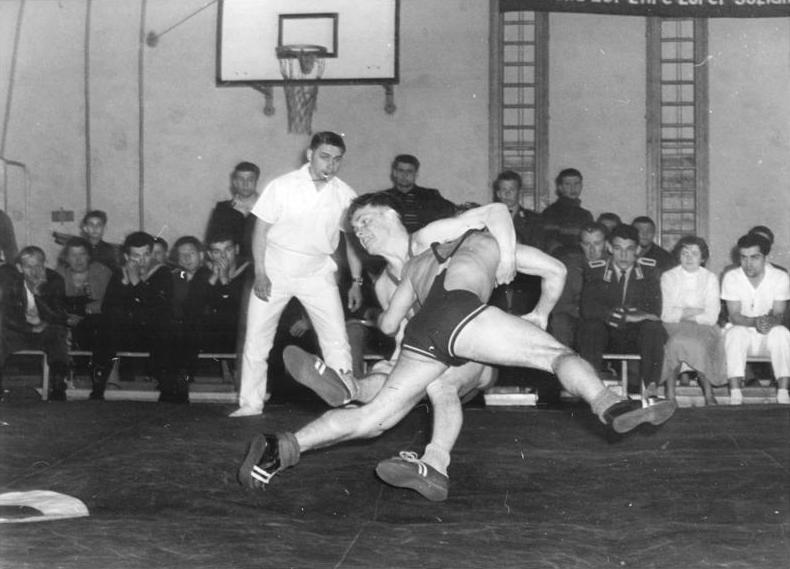 Hartmut Puls, Kroppe Zentralbild Schmidt Tr-Krz. 23.4.1961 Einzelmeisterschaften im Freistil-Ringen In der neuen Sporthalle in Leuna finden an diesem Wochenende die Einzelmeisterschaften im Freistil-Ringen statt. UBz: Im Bantam-Gewicht besiegte Puls (Luckenwalde) den Leipziger Kroppe.